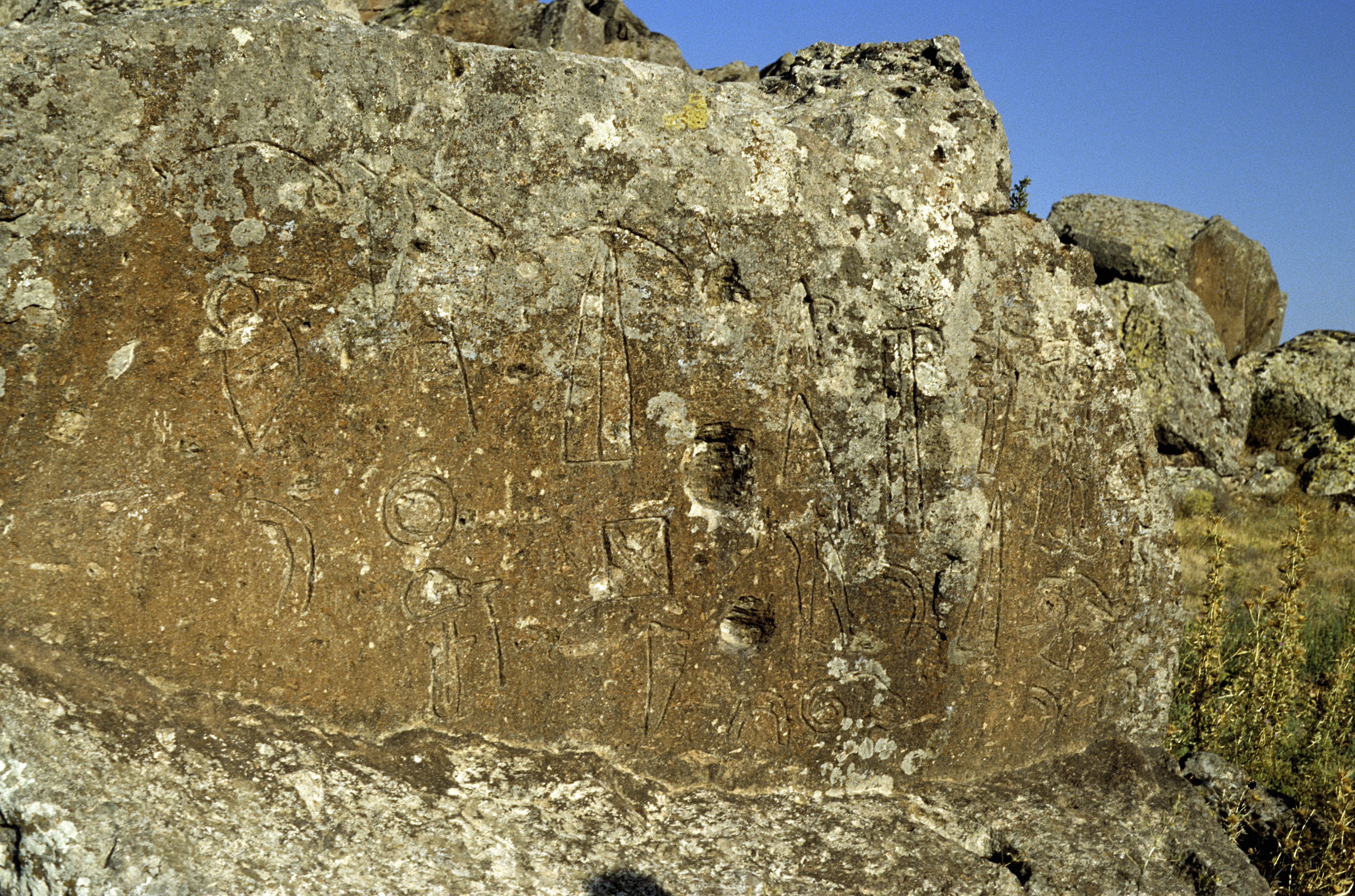 Suvasa, Hieroglyphen-luwischer Inschriftenstein bei Gökçetoprak, Gülşehir, in Kappadokien, Zentraltürkei